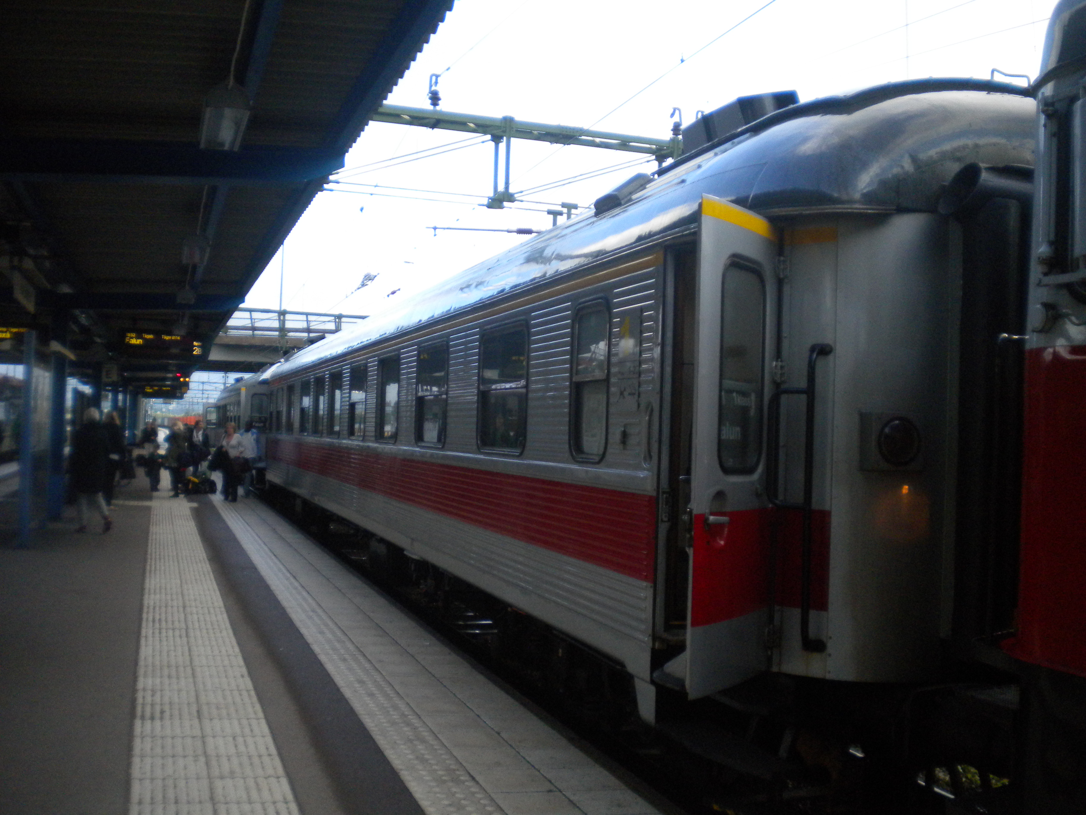 Tågåkeriet i Bergslagen AB AB3 nr. 4885 på Borlänge Central. Vagnen är en av tre i reguljär trafik kvarvarande av typen.